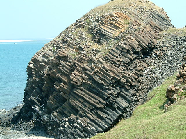 中文（台灣）: 臺灣澎湖縣員貝嶼的石硯